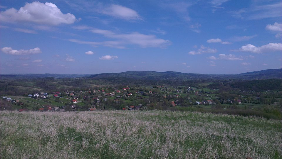 Widok z góry Kępy na Jastrzębię